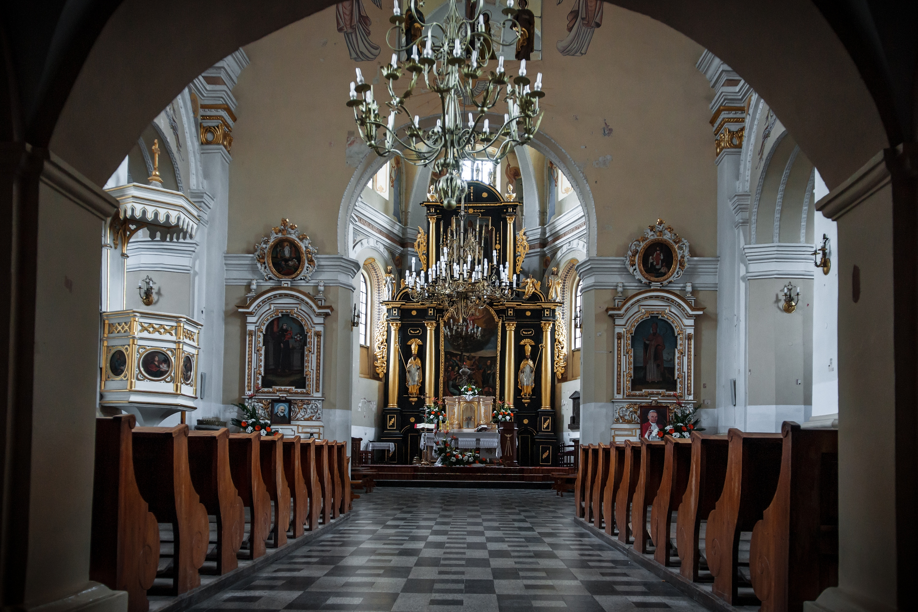 Modliborzyce, kościół par. p.w. św. Stanisława Biskupa, 1664-1668, XVIII